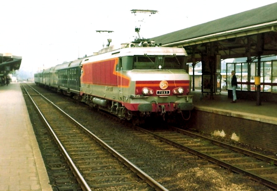 Proefrit SNCF E-loc 7003 door Hilversum. Later zou de NS aan de hand van deze loc de serie NS 1600 bestellen.